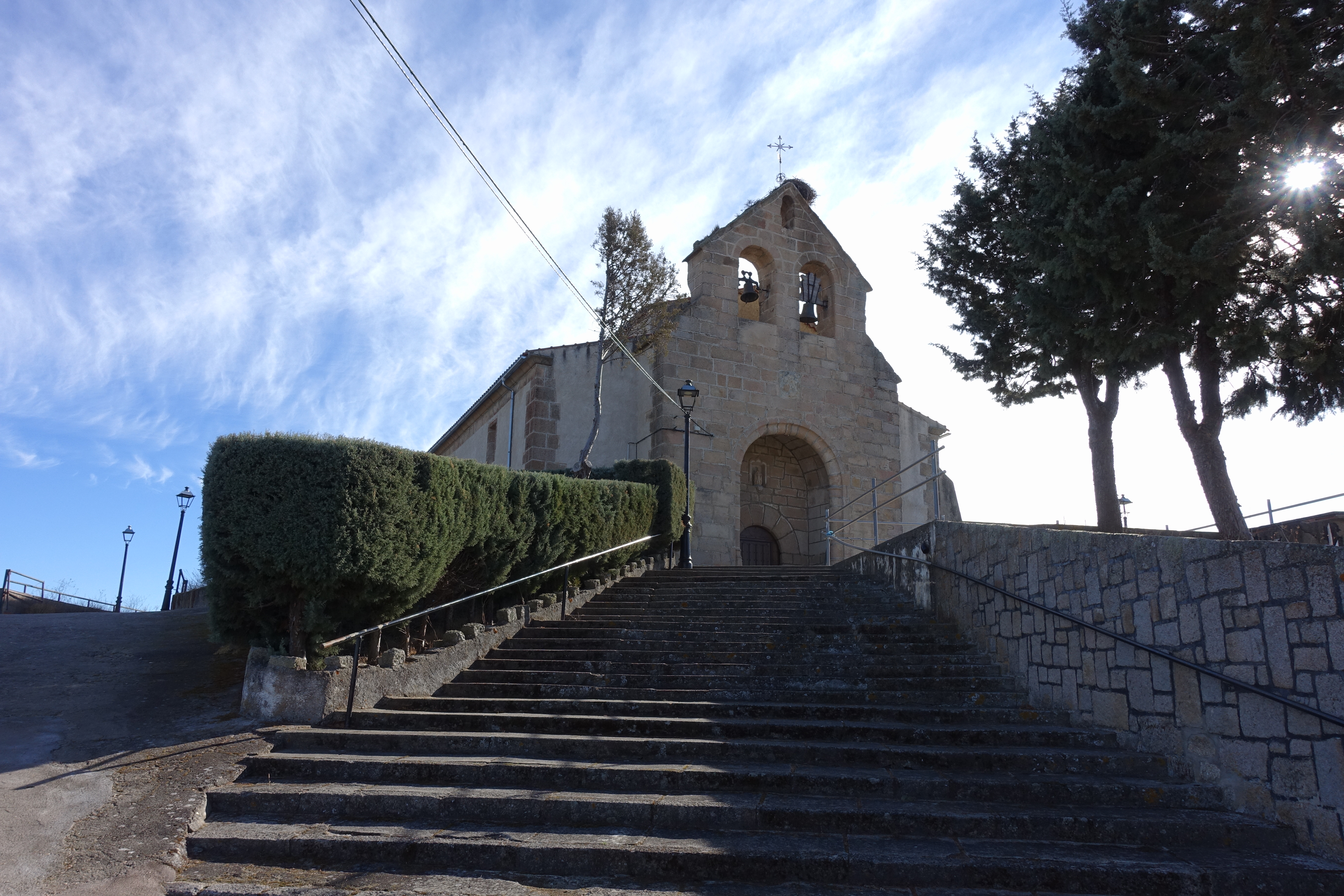 Iglesia de San Silvestre, Ituero de Azaba (Salamanca, España).